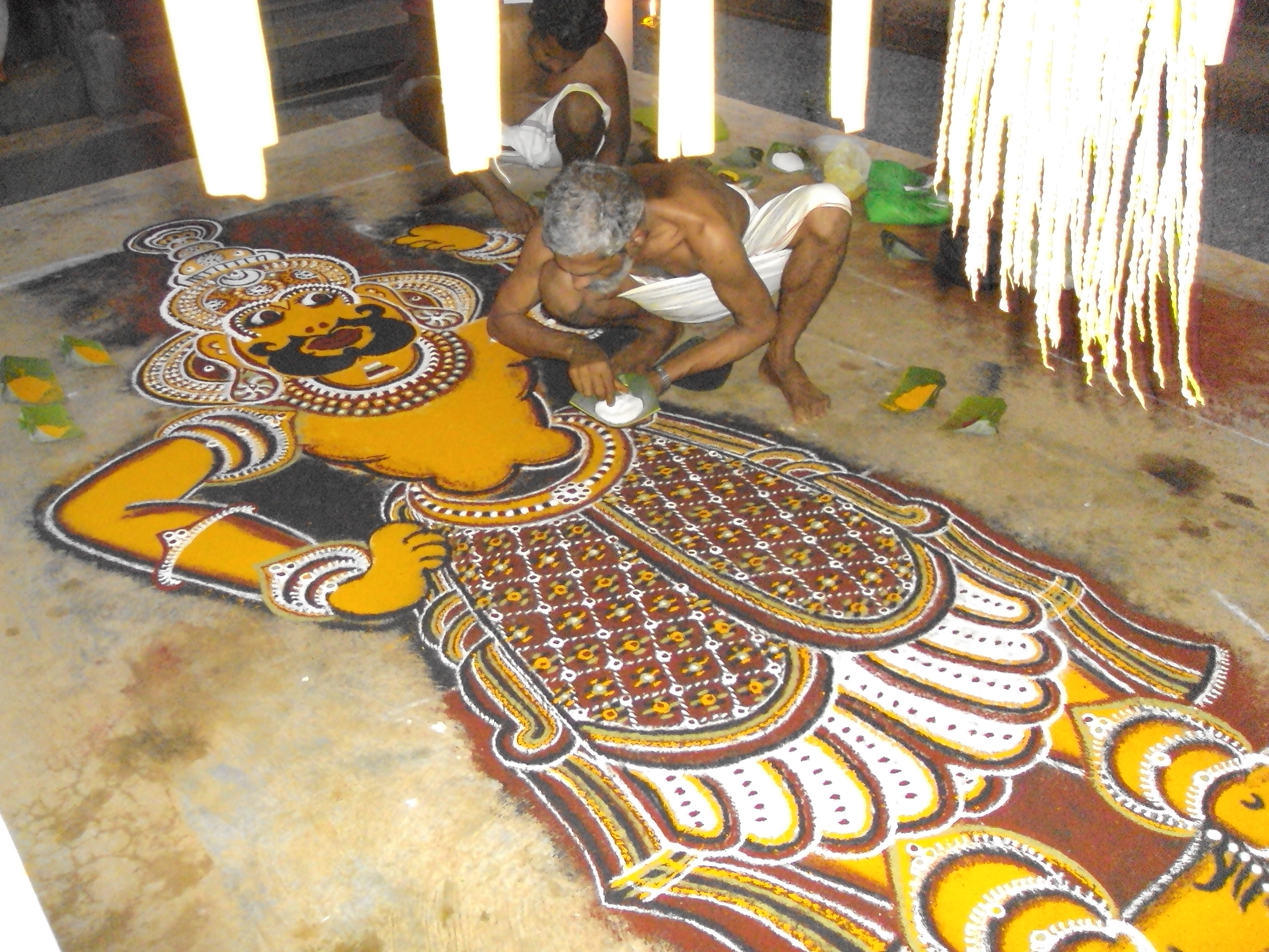 അനുഷ്ഠാന കല